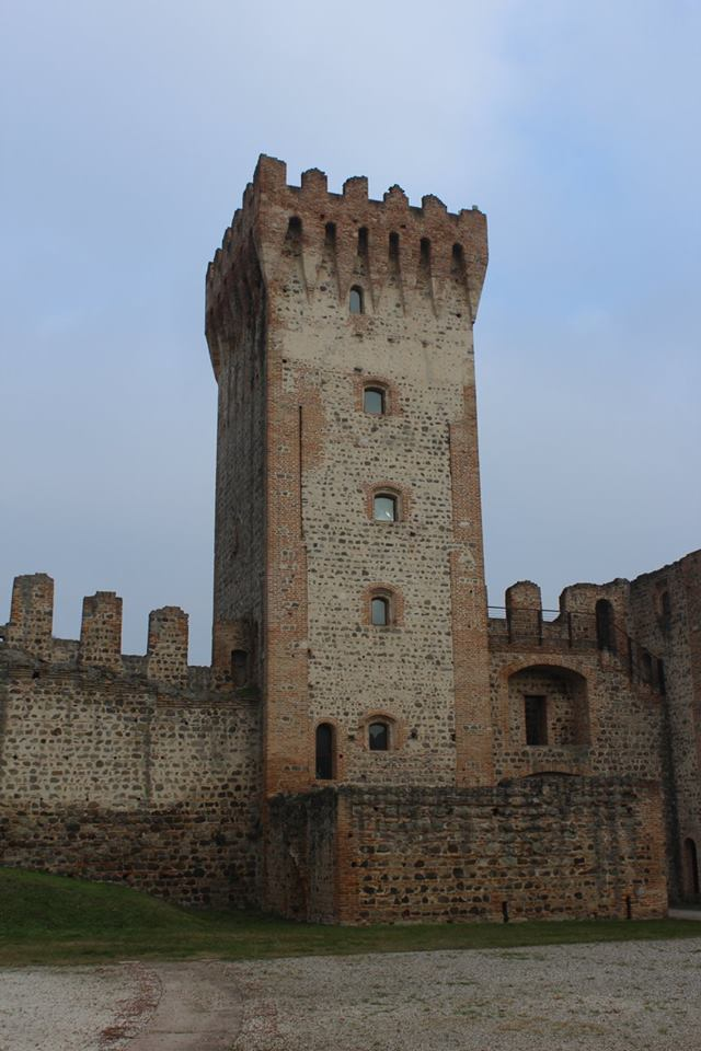 Castello dei Carraresi This is a photo of a monument which is part of cultural heritage of Italy.